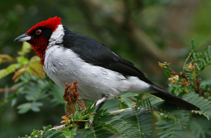 Red-capped Cardinal (Paroaria gularis nitrogenis) - Parque del Este, Caracas, Venezuela